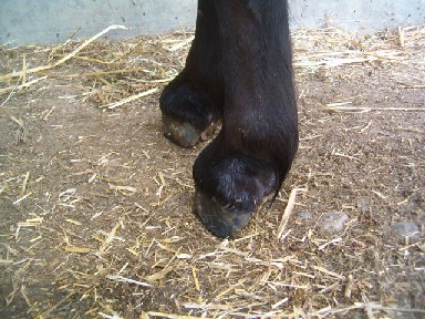 Die Vorderhufe dieses Ponys haben sich schon seit seiner frühen Jugend zu Bockhufen entwickelt.